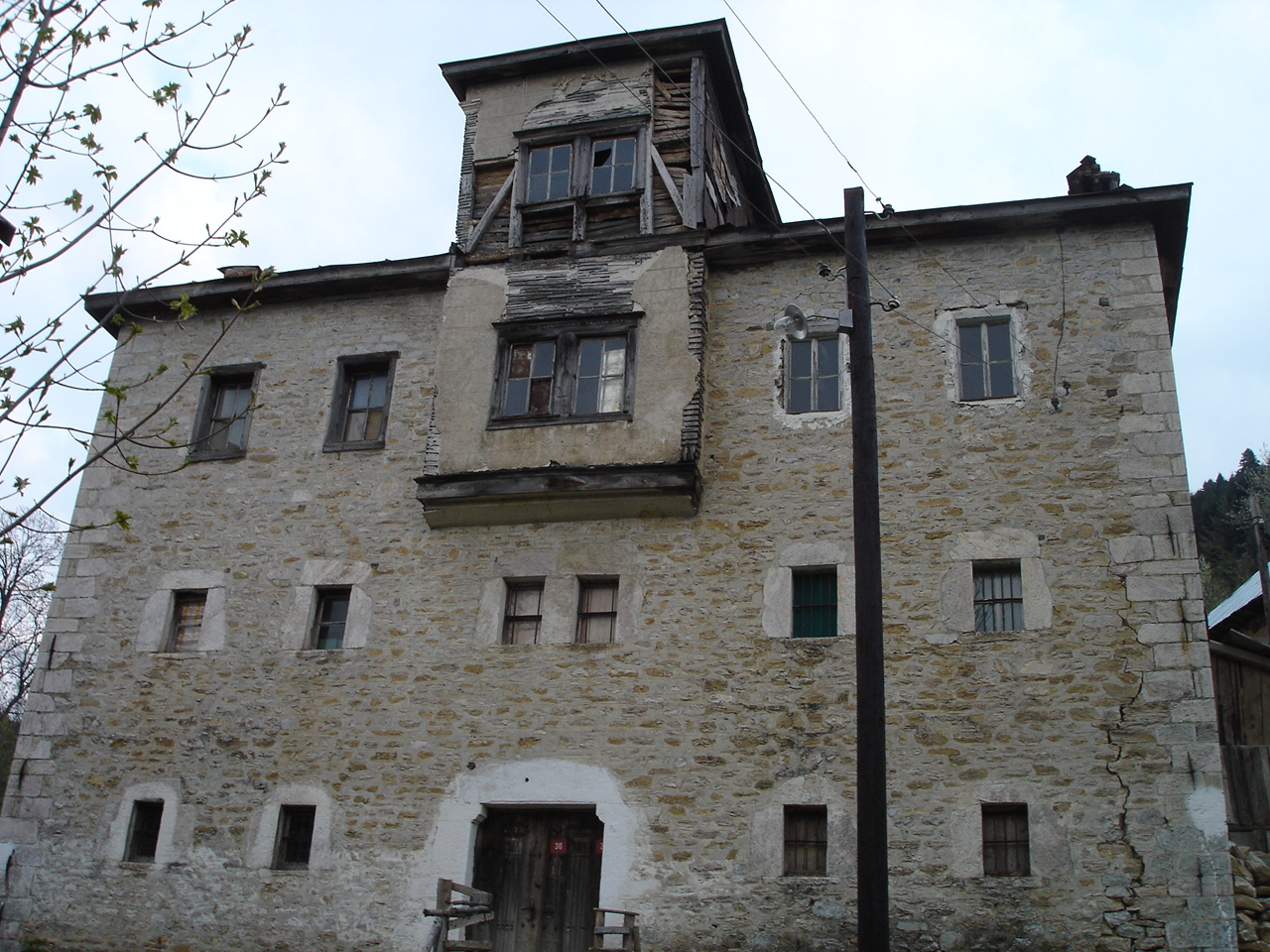 Къщата на Глигоровци в реканското село Вълковия, Република Македония.